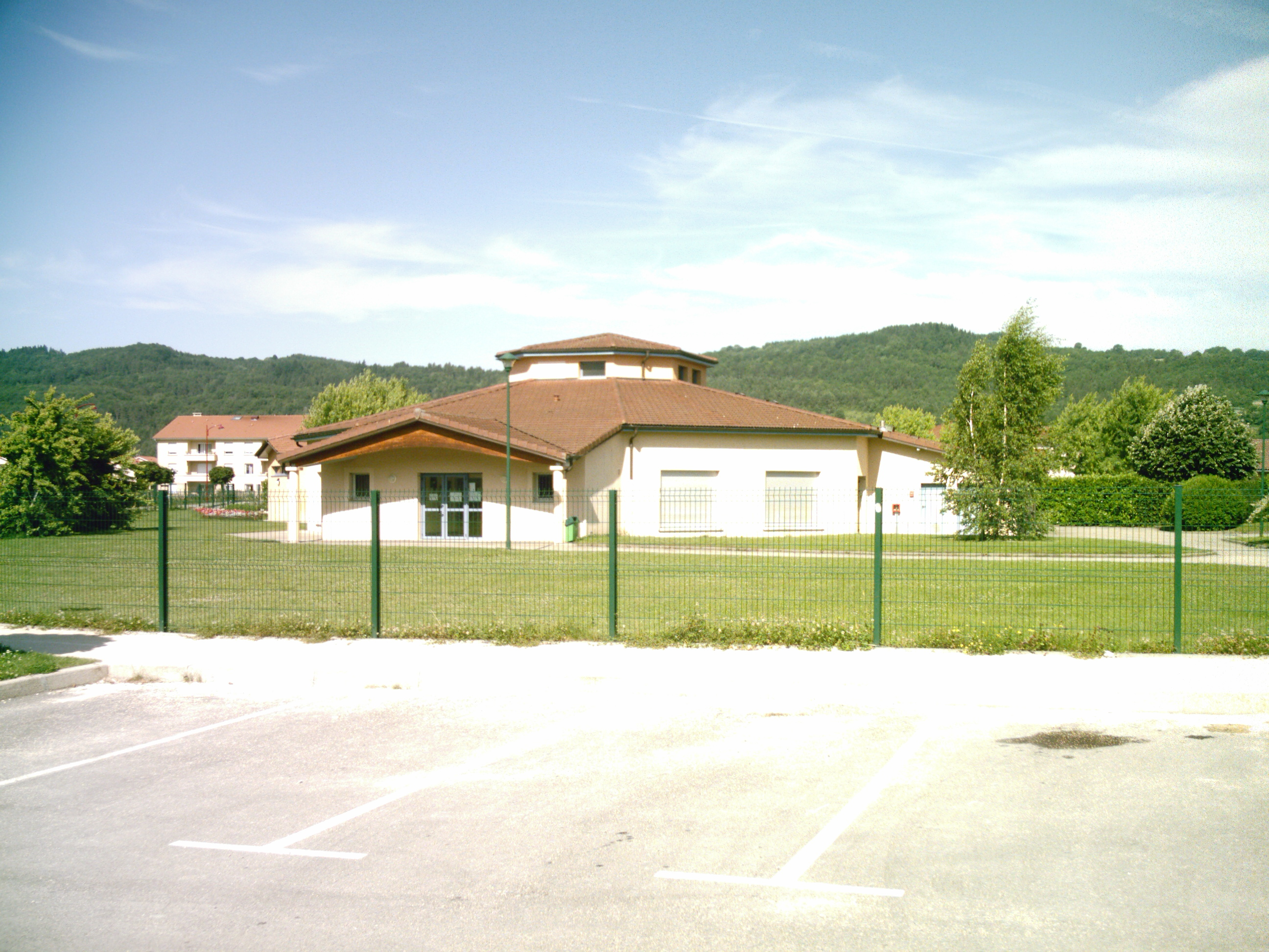 Le groupe scolaire d'Izernore (le côté cantine)